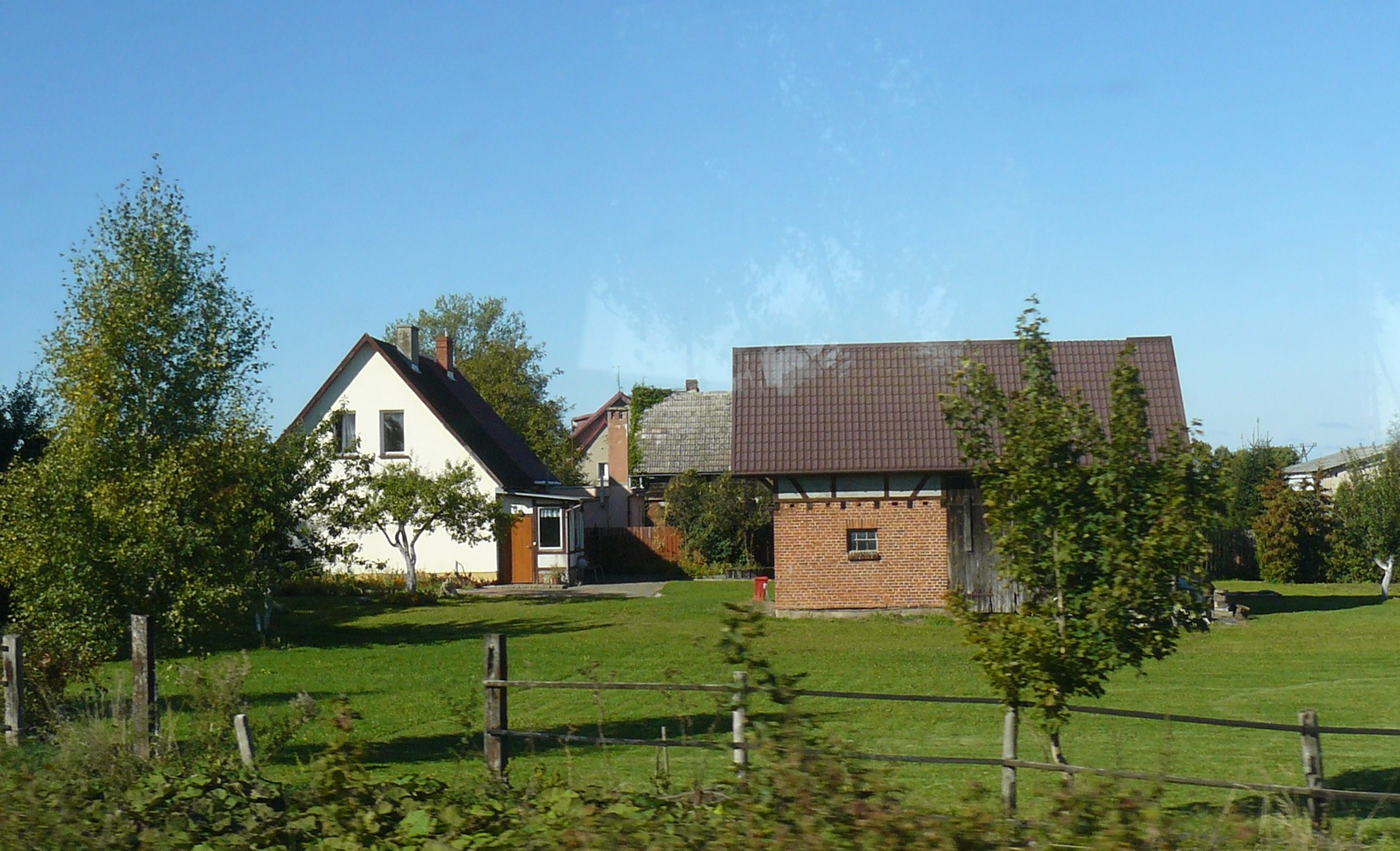 Głowaczewo.